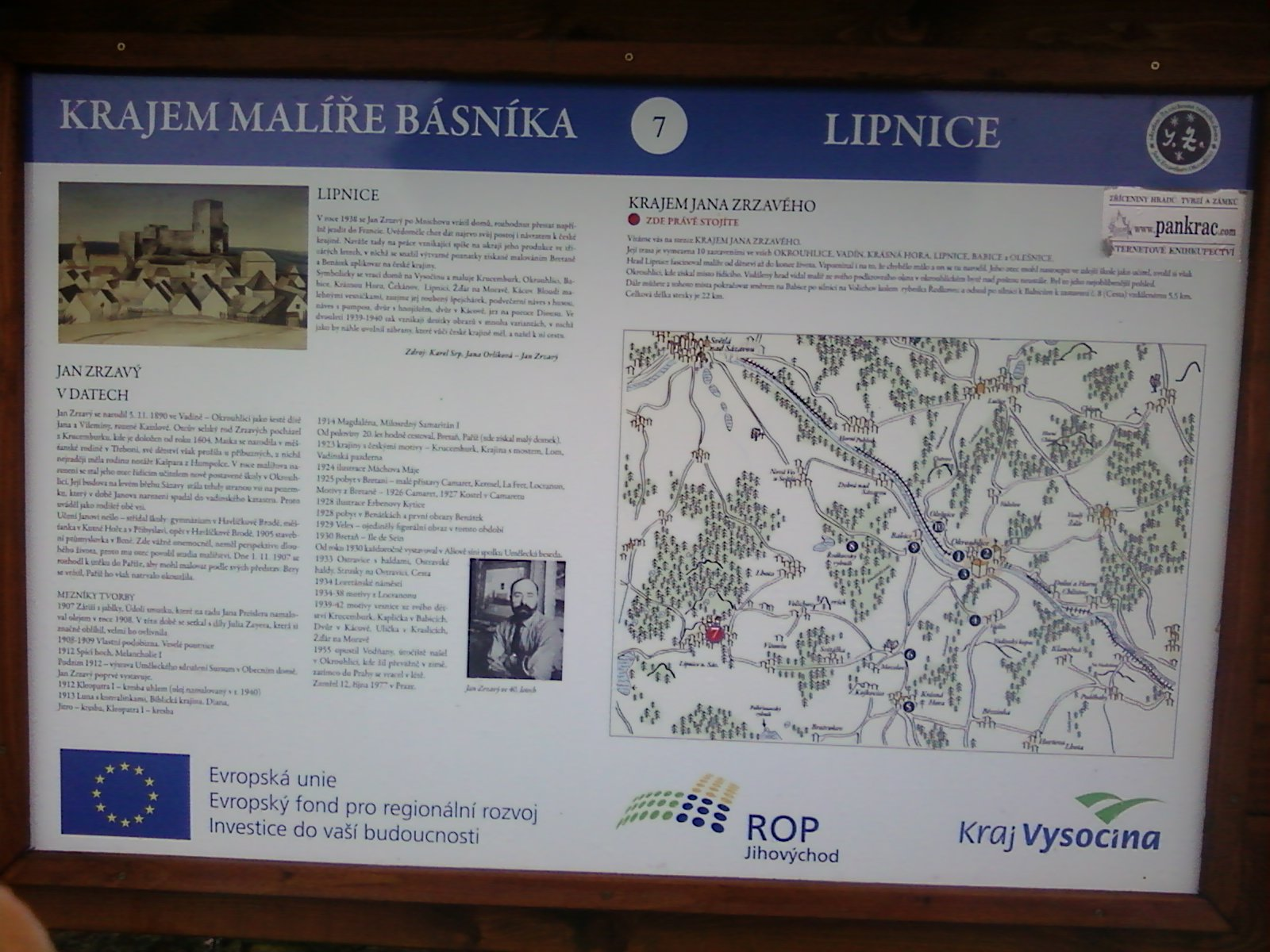 zastavení NS Krajem malíře - básníka Jana Zrzavého s názvem Lipnice